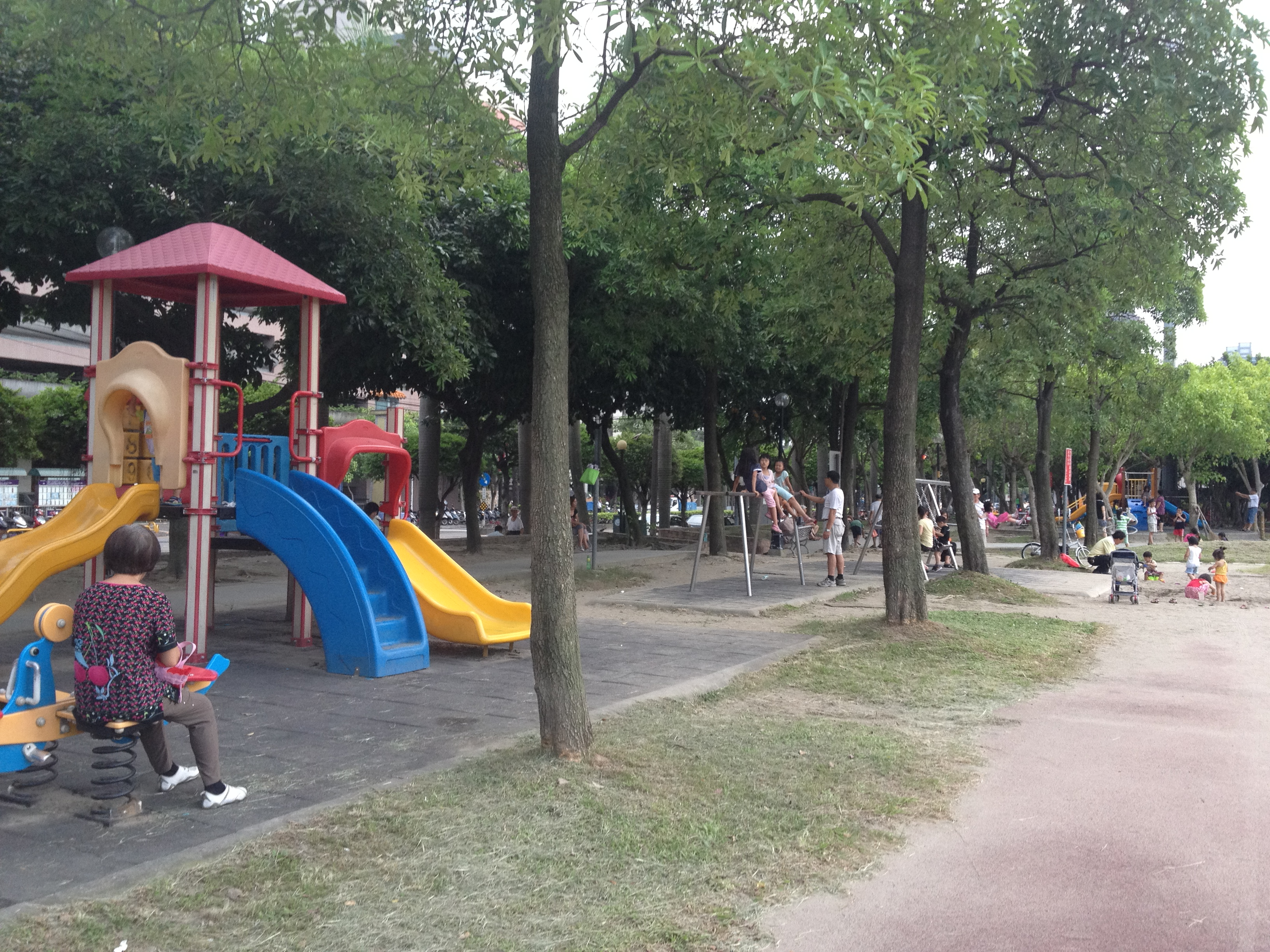 新北市三重區綜合運動場兒童遊戲區。